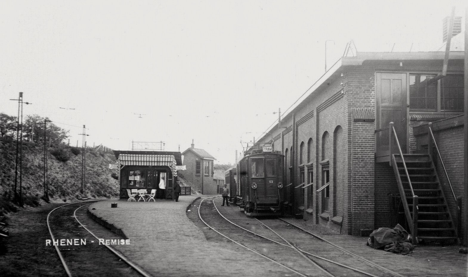 Tramremise van de NBM aan de Zwarteweg te Rhenen, met motorwagen 53 en links het perron van het tramstation; circa 1935. Collectie van het Utrechts Archief.